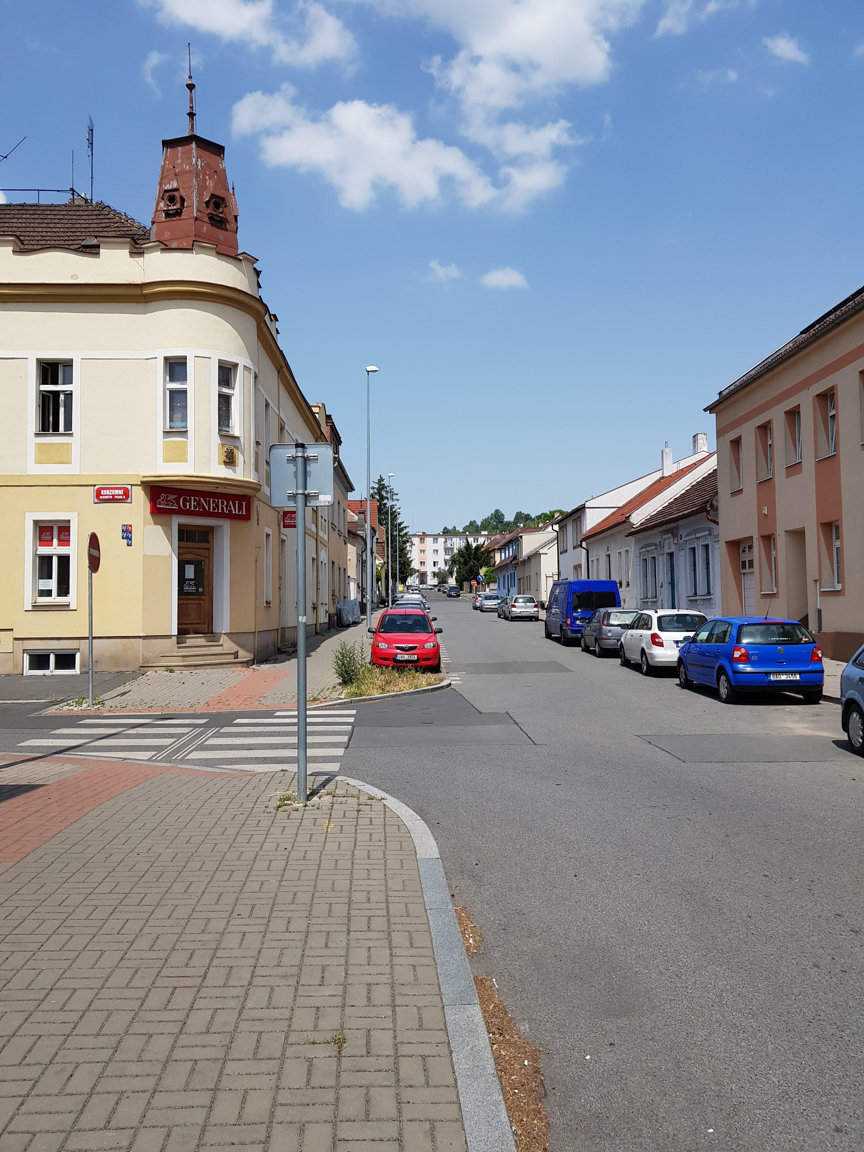 Ulice Pod Turnovskou tratí, Praha-Hloubětín, pohled od jihu